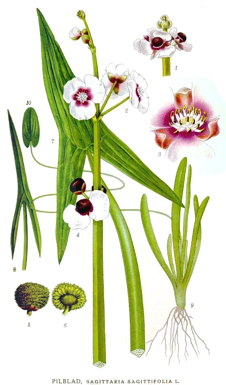 Sagittaria sagittifolia L. Original Description Pilblad, Sagittaria sagittifolia L.